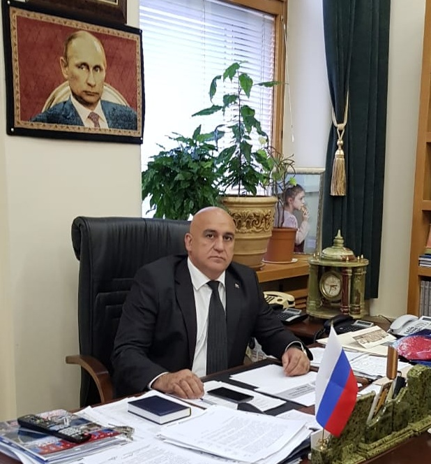 Vüqar Zeynalov Rahib oğlu